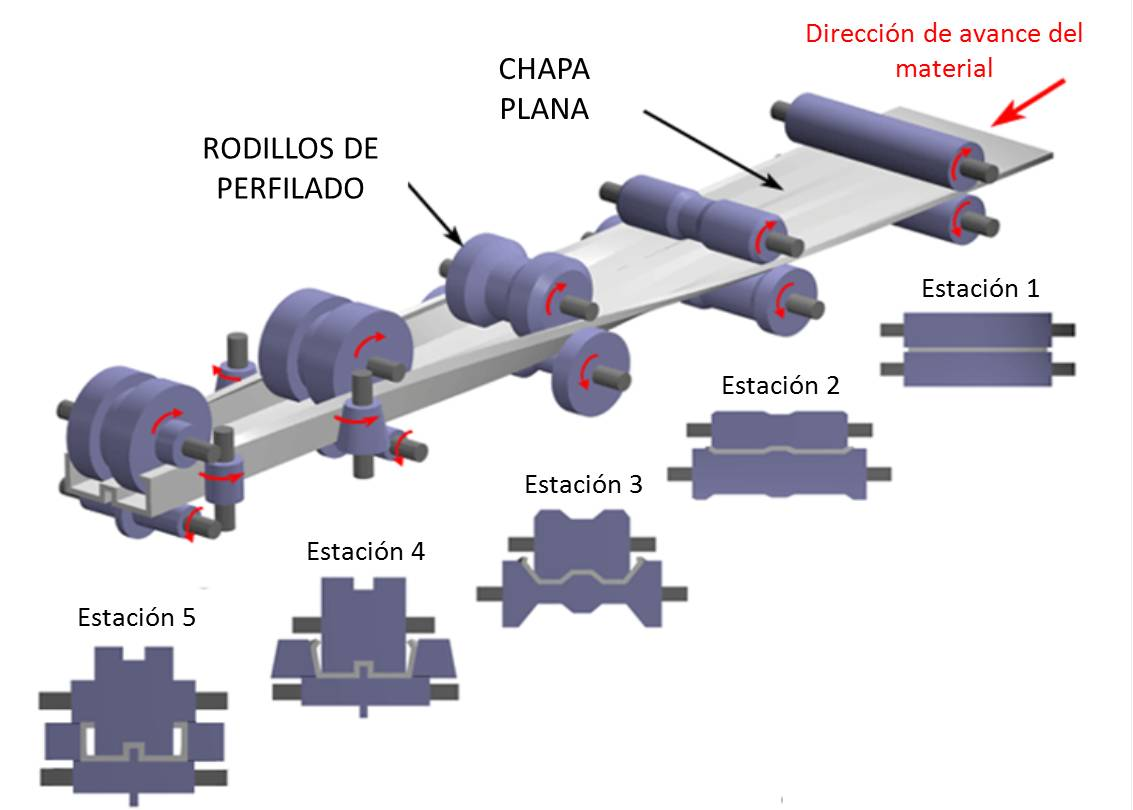 El perfilado de chapa es un proceso de conformado por deformación plástica. En él, las herramientas son rodillos distribuidos en sucesivas estaciones, en cada una de las cuales tiene lugar una etapa del conformado. Además, el giro de los rodillos hace que por rozamiento la chapa vaya avanzando de estación en estación.